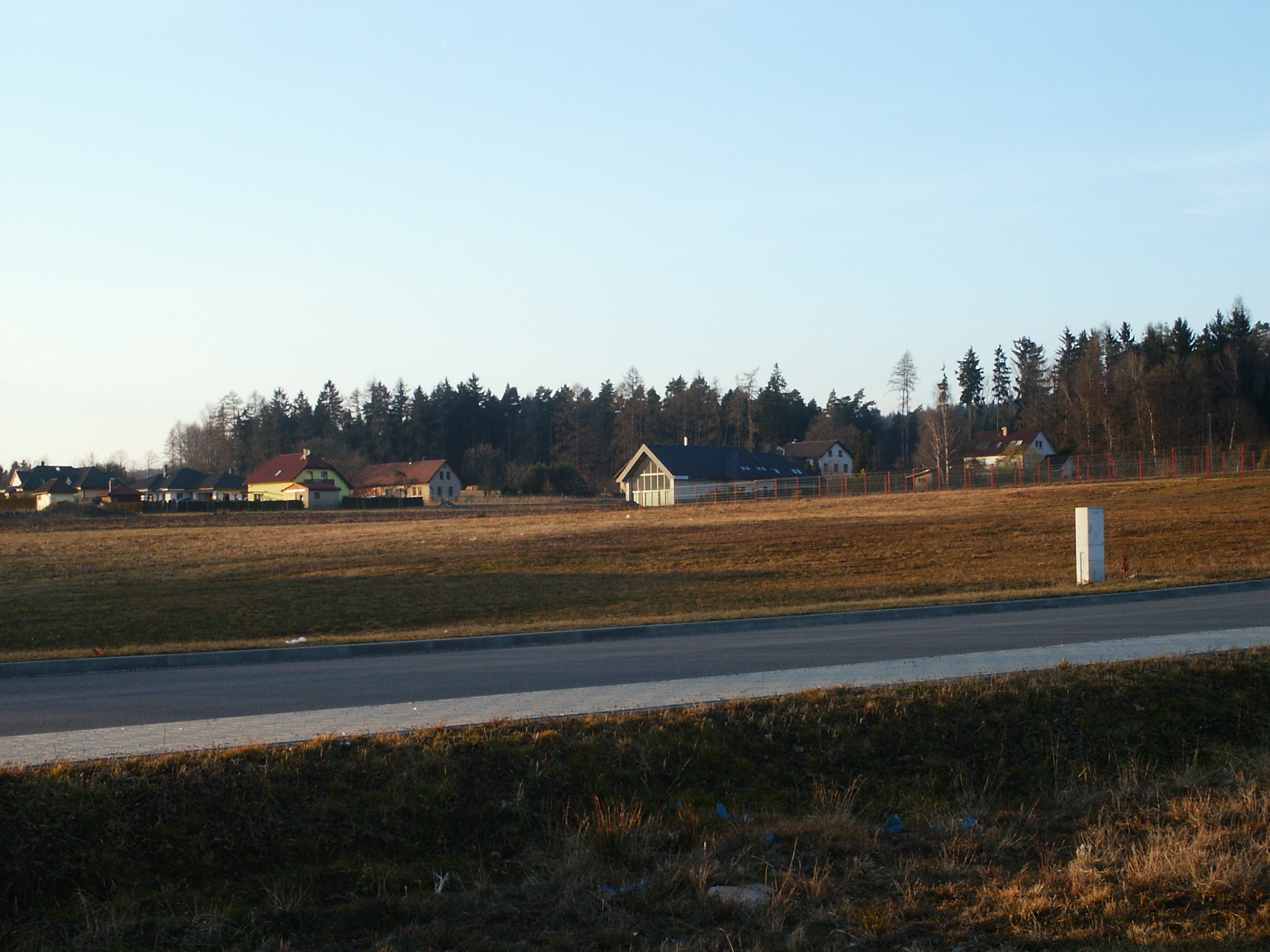 Vlkov - celkový pohled